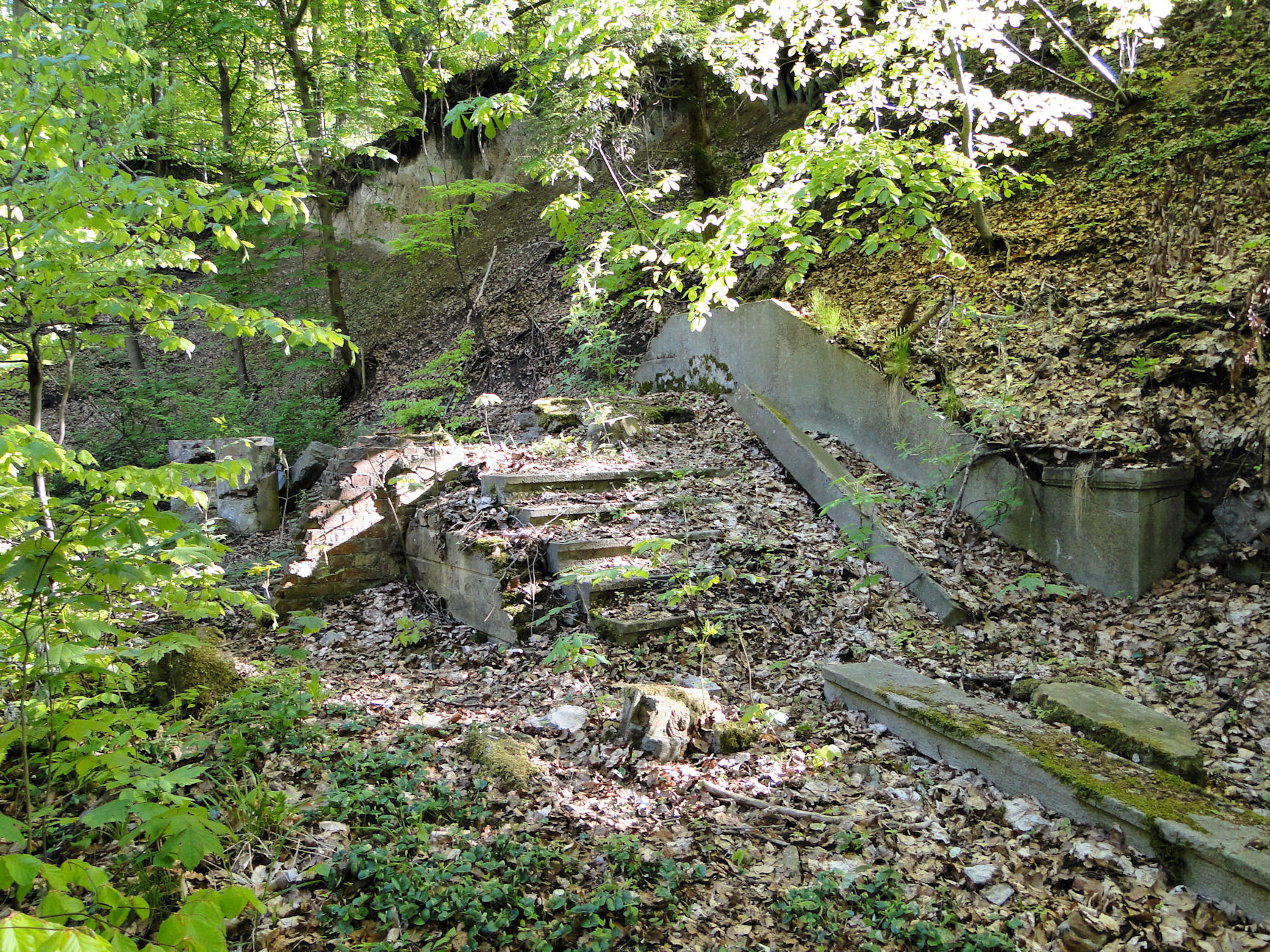 Ruiny pałacu Toepffera przy ul. Grabowej w Szczecinie Zdrojach